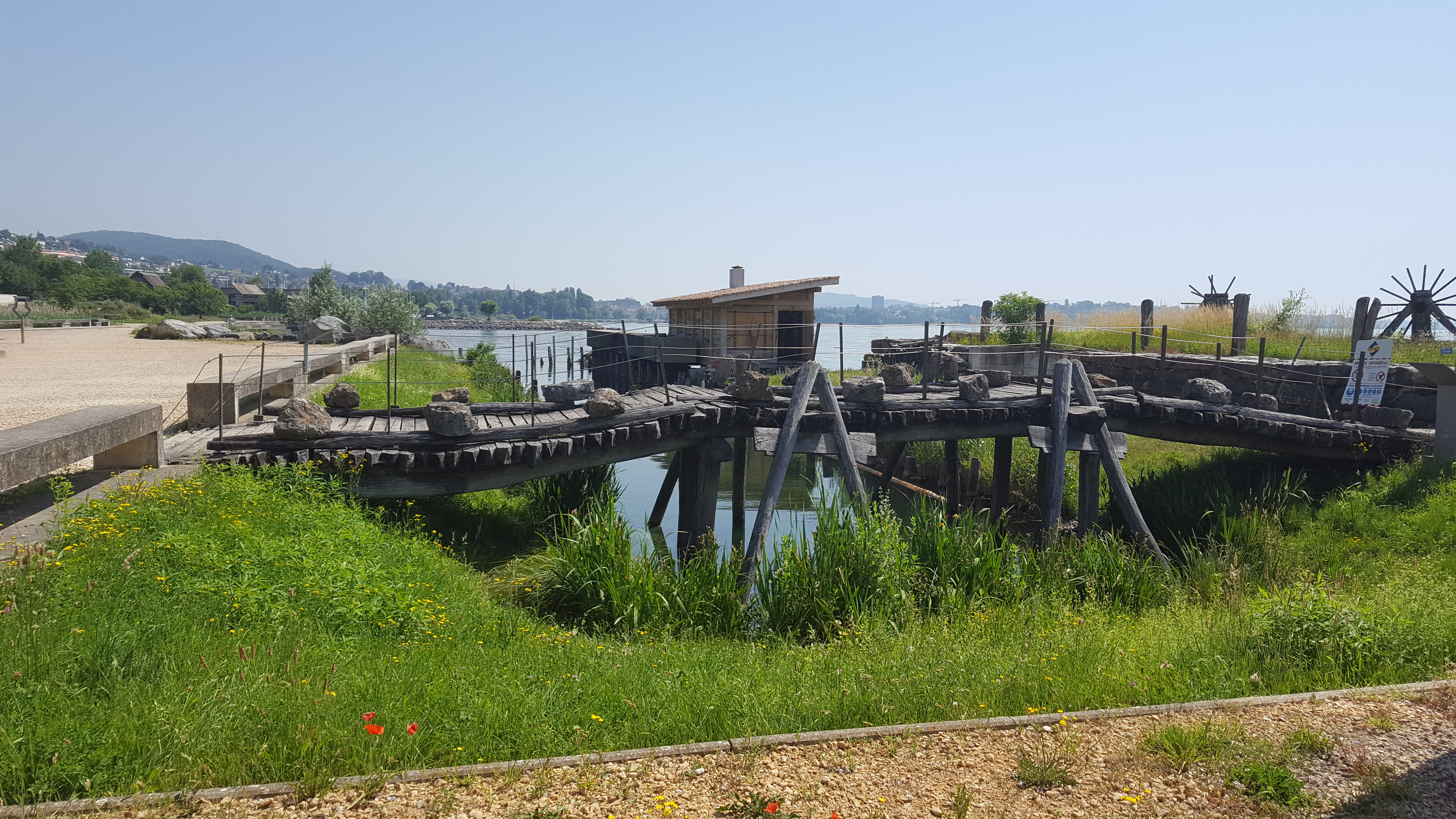 Il s'agit d'un reconstitution d'un pont celtique. Plus précisément celui de Cornaux. Il se trouve dans la parc archéologique du Laténium dans le canton de Neuchâtel